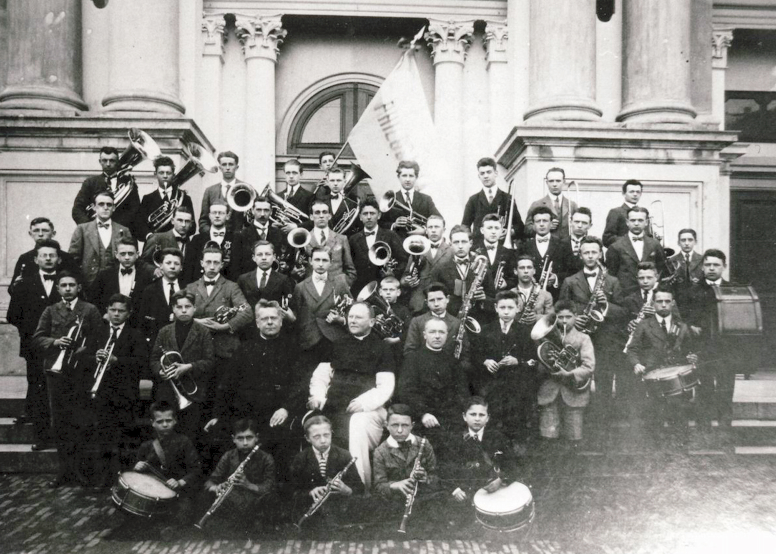 Muziekvereniging "Philocalia" uit Oudenbosch omstreeks 1935 poserend voor de Basiliek.